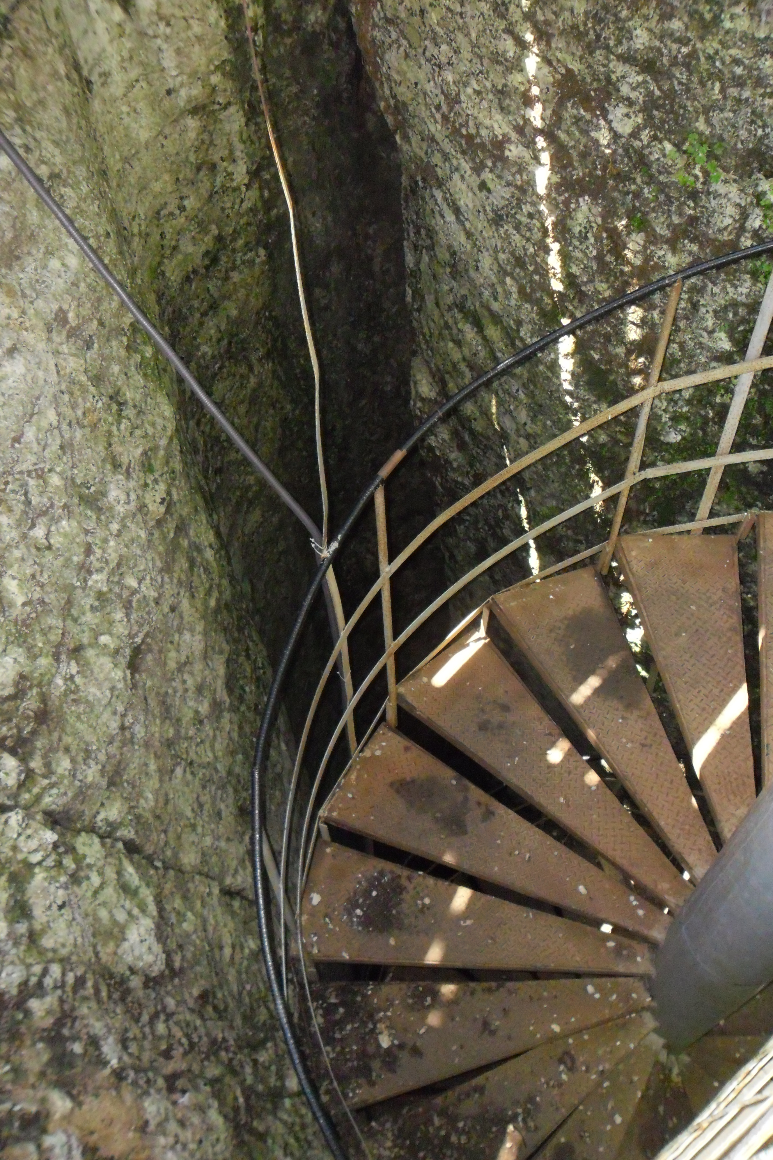 Фото